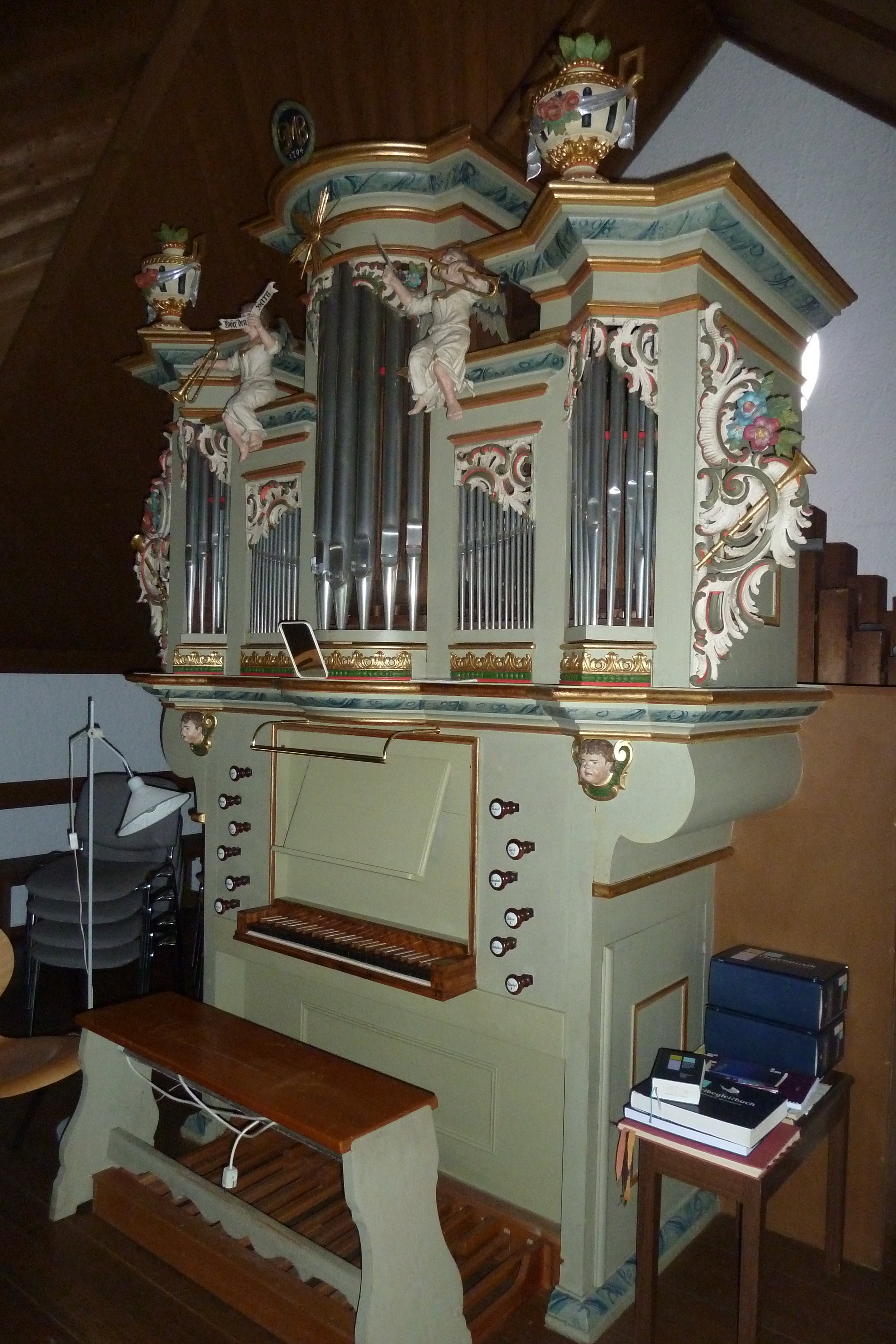 Orgel der Kilianskirche in Oettingshausen